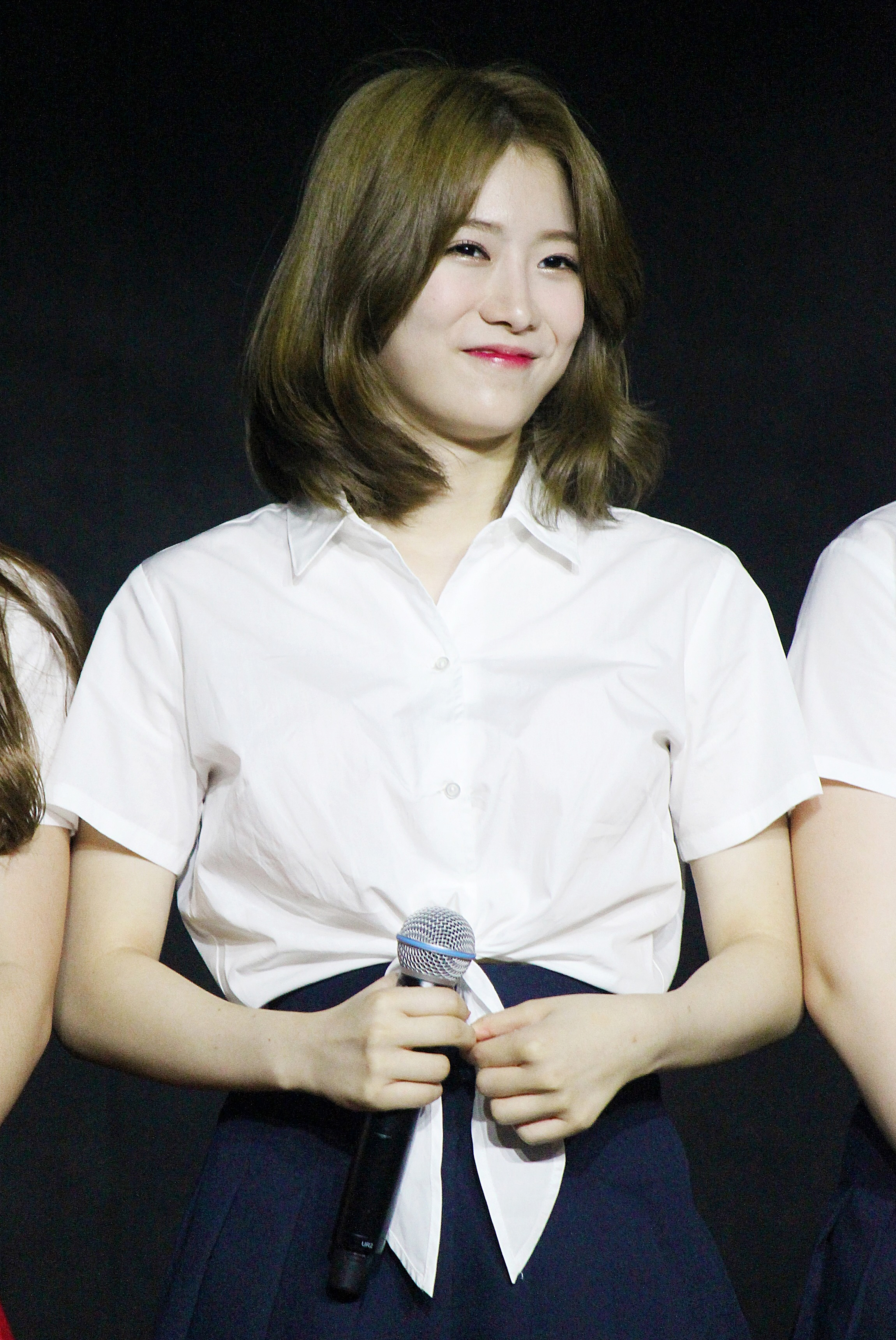 160625 플레디스걸즈 콘서트 임나영 김민경 강경원 강예빈 배성연 김예원 박시연 카일라 직찍